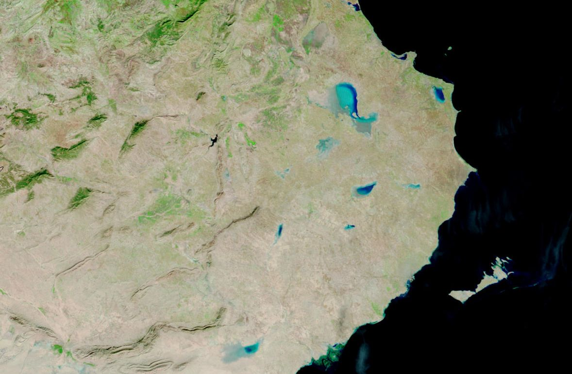 Le centre de la Tunisie